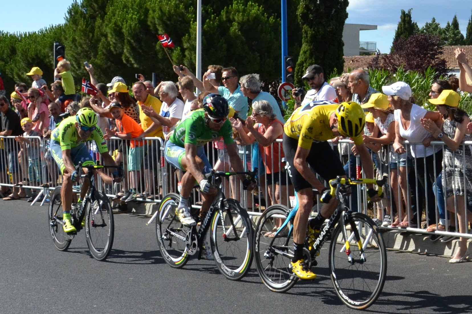 11e étape du Tour de France 2016 : Chris Froome, Peter Sagan et Maciej Bodnar à 500 m de la ligne d'arrivée.